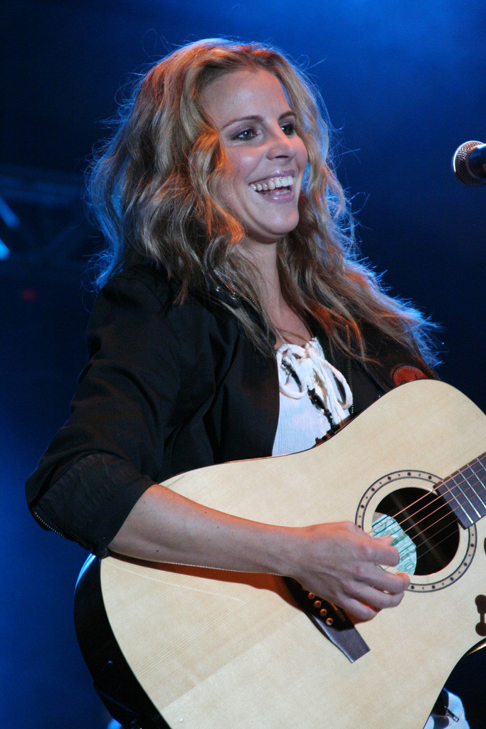 Lisa Miskovsky performing live during SR Festival at Kungsträdgården in Stockholm